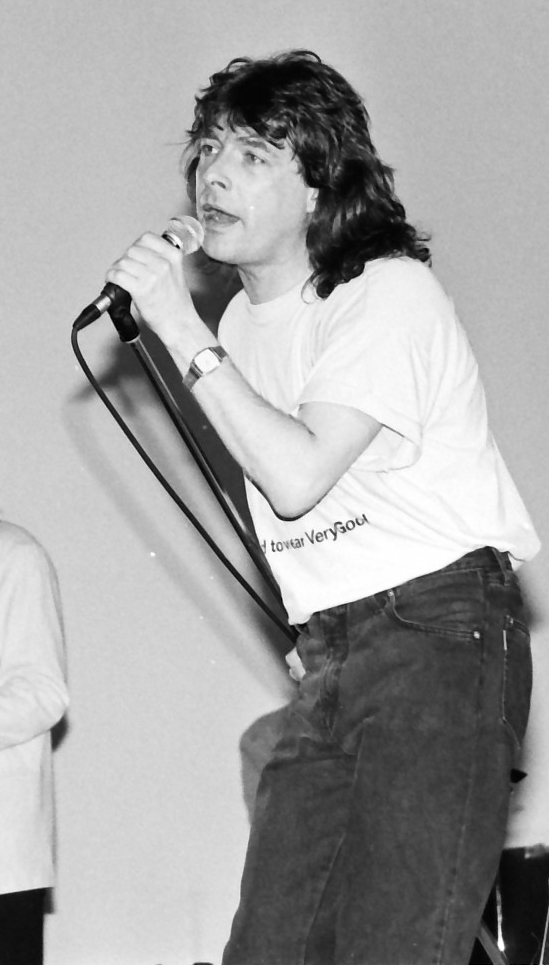 Kirka Kuusankoskitalon "Surun pyyhit silmistäni" -konsertissa 12.5.1989